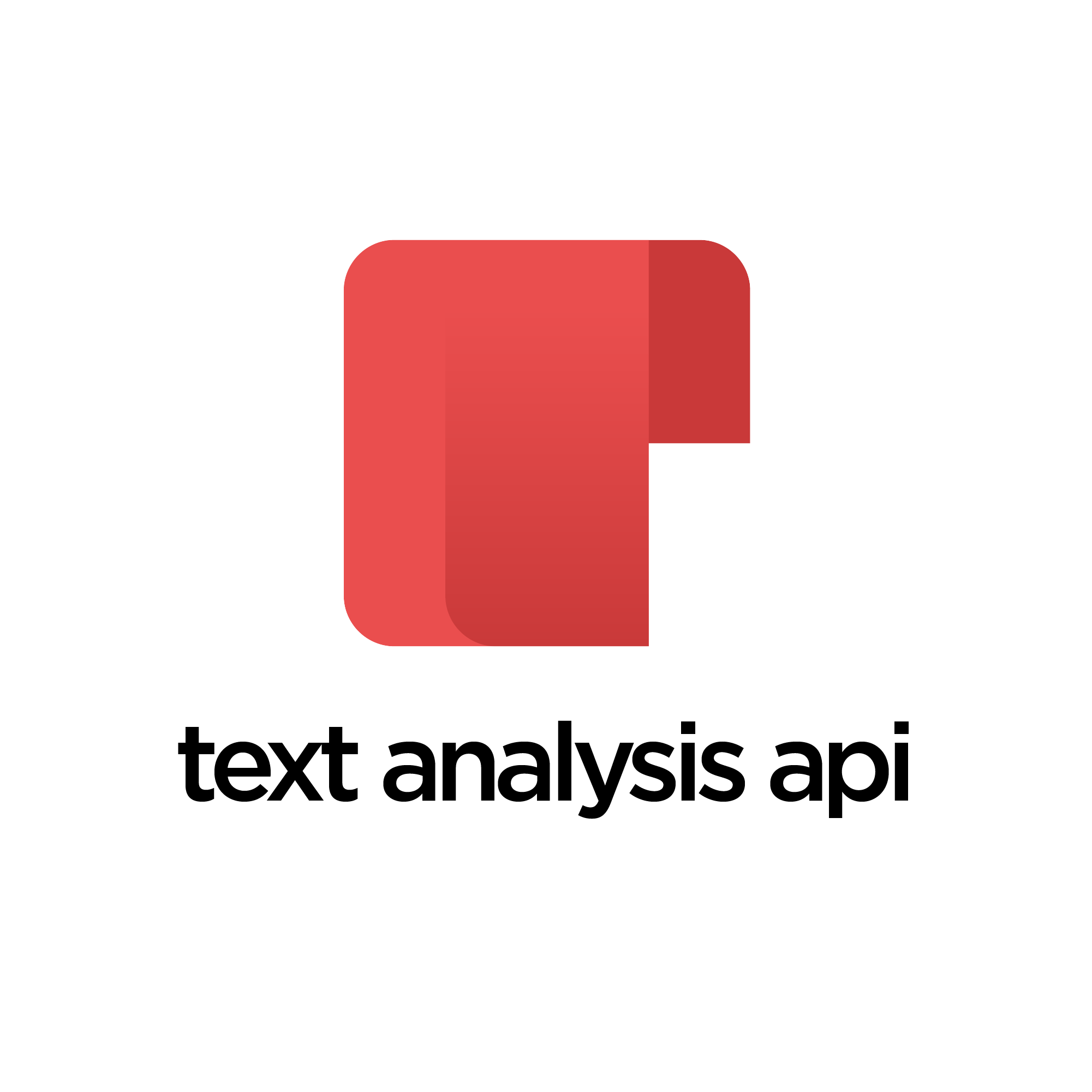 A Text Analysis API logója